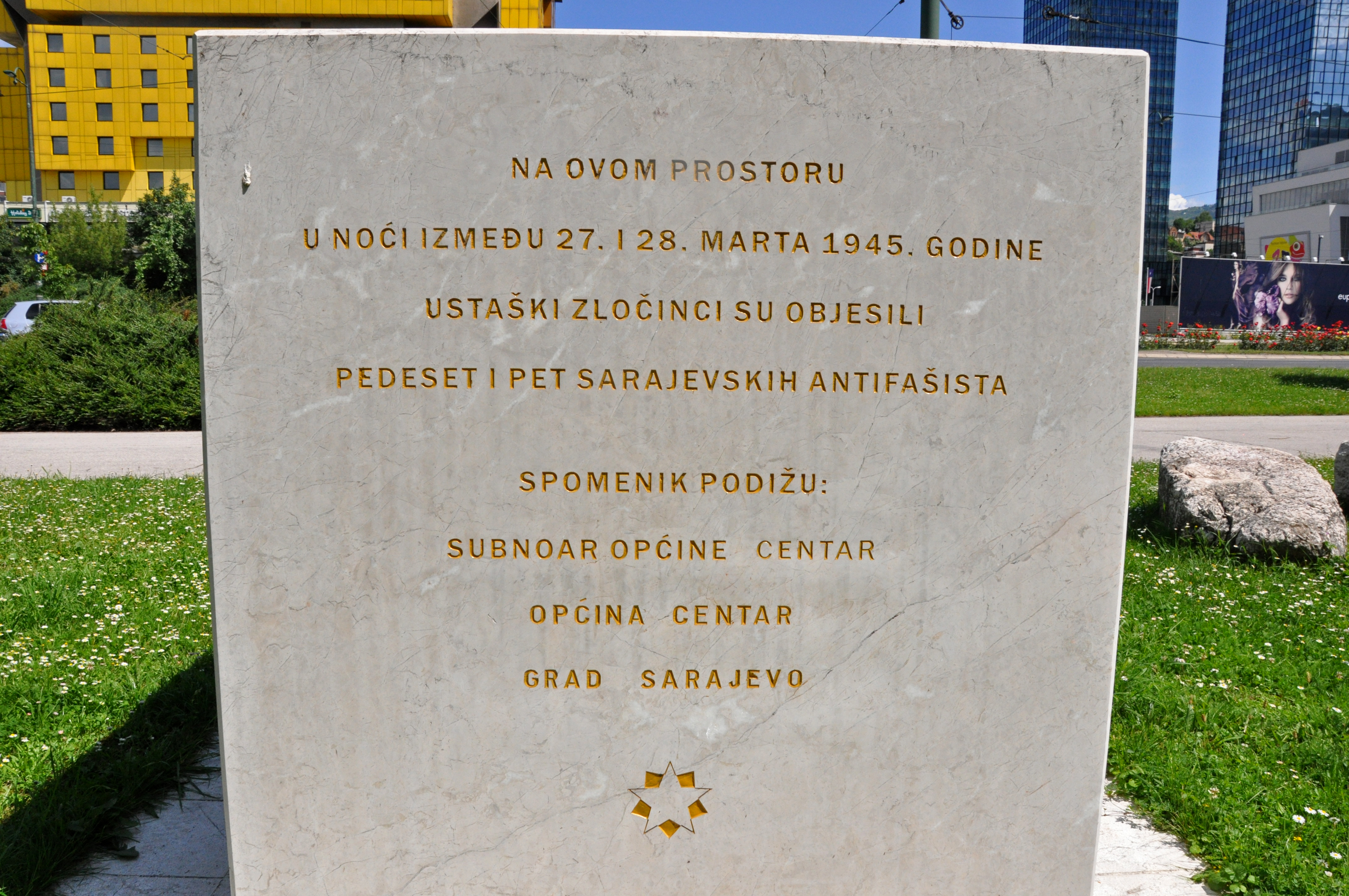 antifascist monument